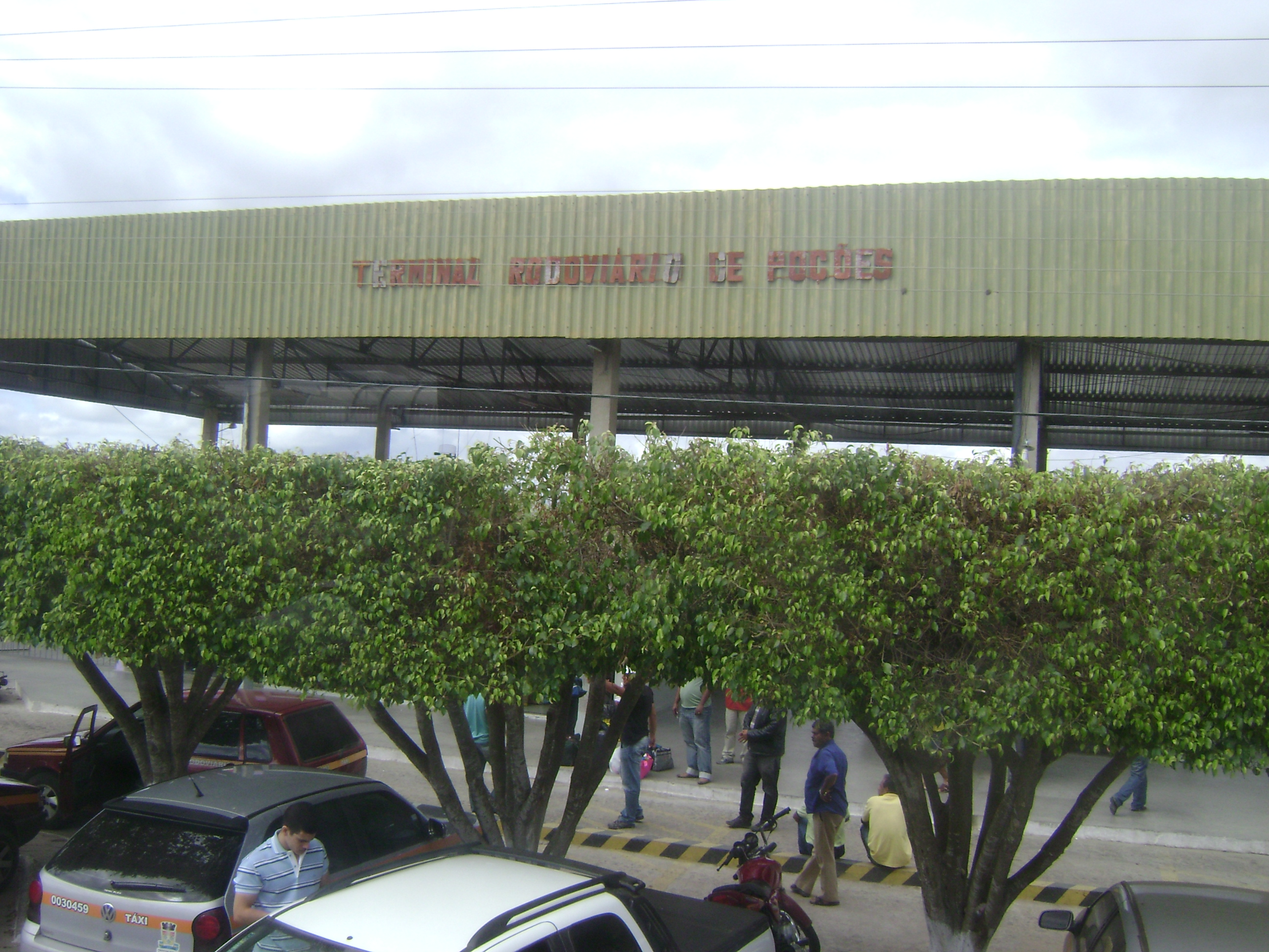 Terminal rodoviário de Poções.